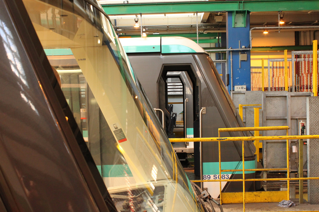 Un MP 89 de la ligne 1 à côté d'un train MP 05 de la même ligne.